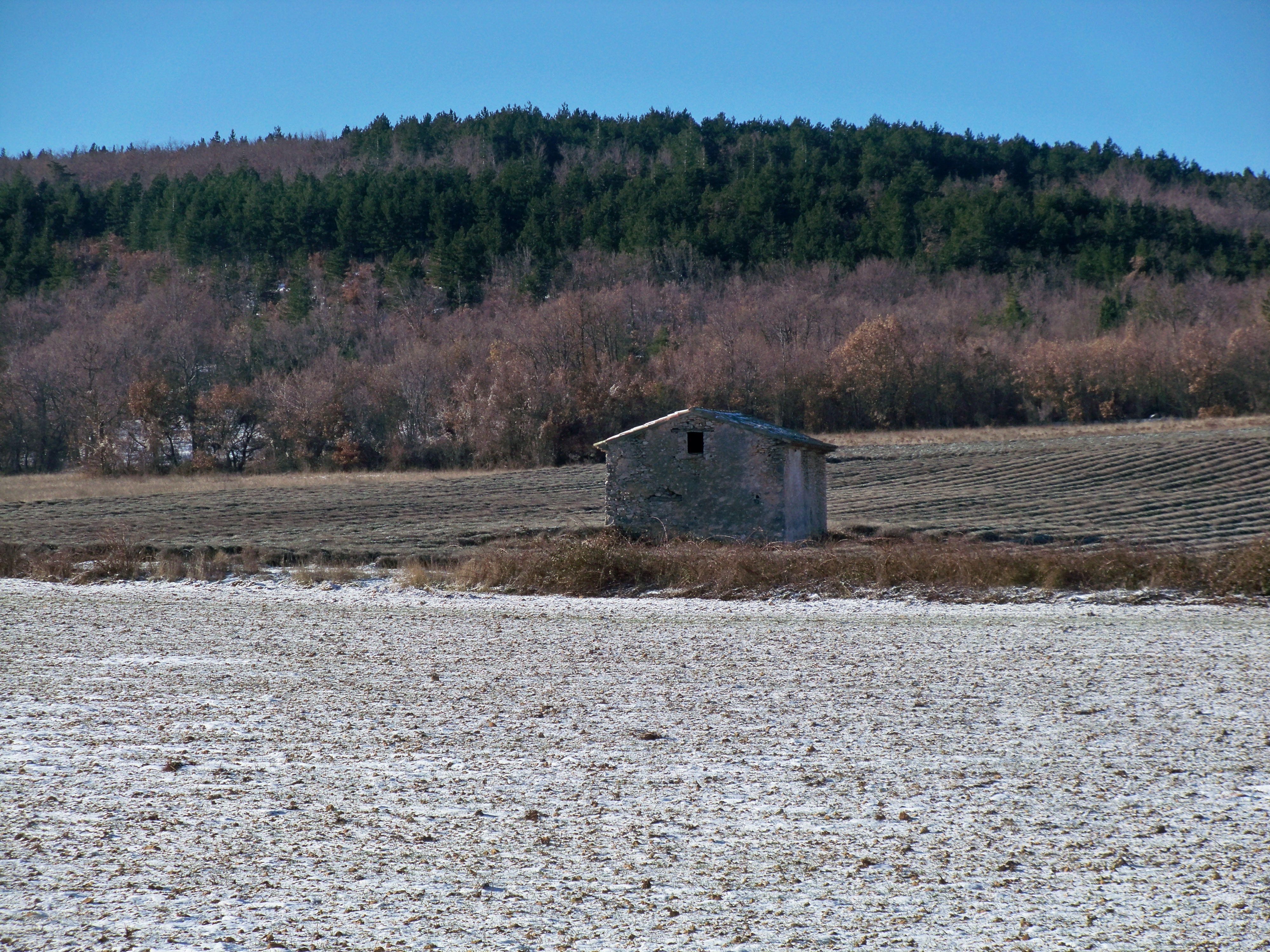 Cabanon à Saint Christol (Vaucluse, France)